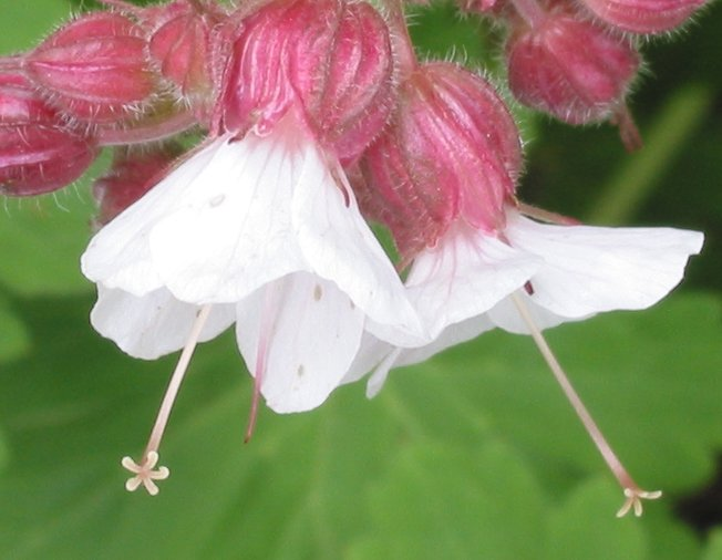 zelfgemaakte foto van Geranium macrorrhizum met open gespleten stempel